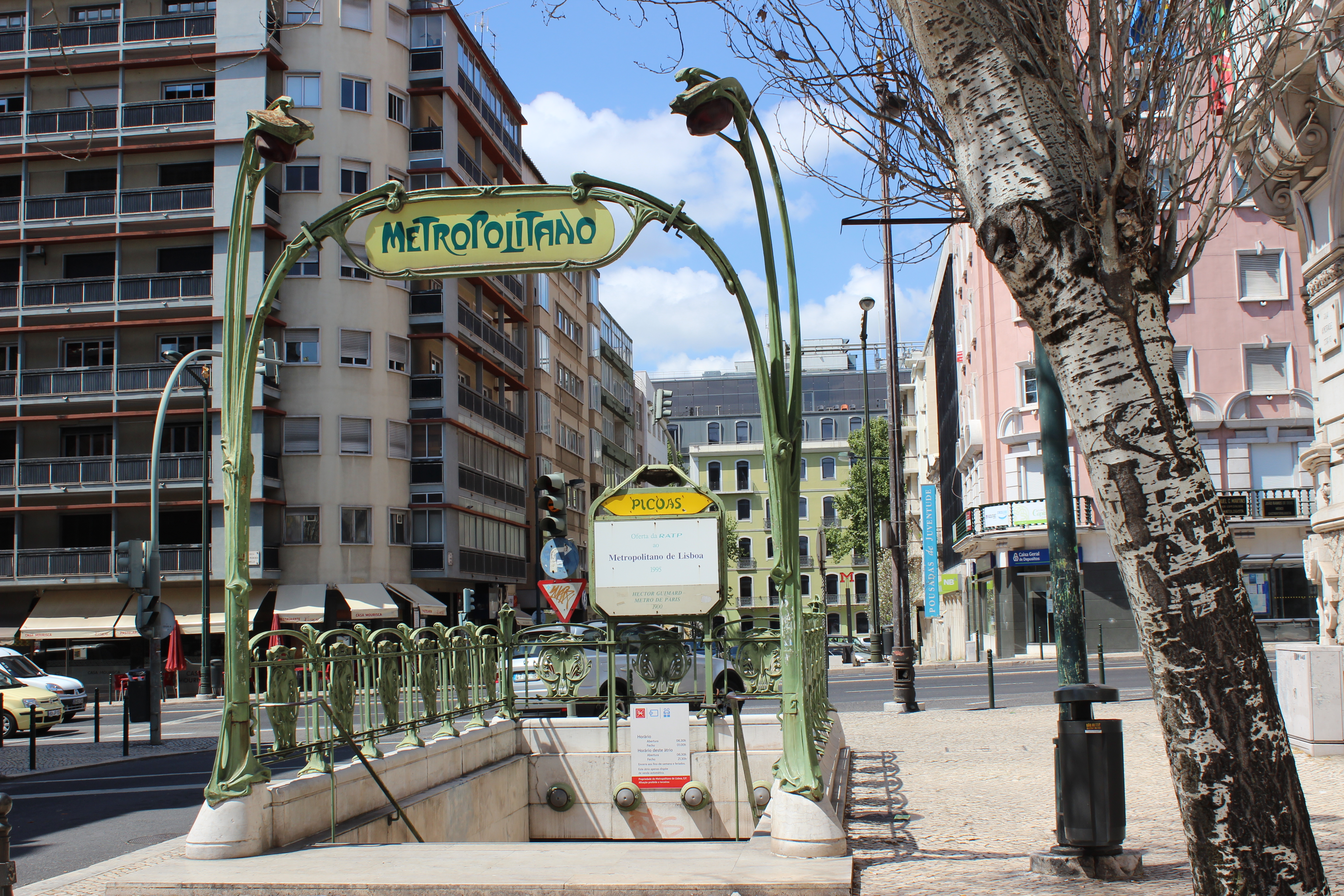 Lisboa / Lisbon